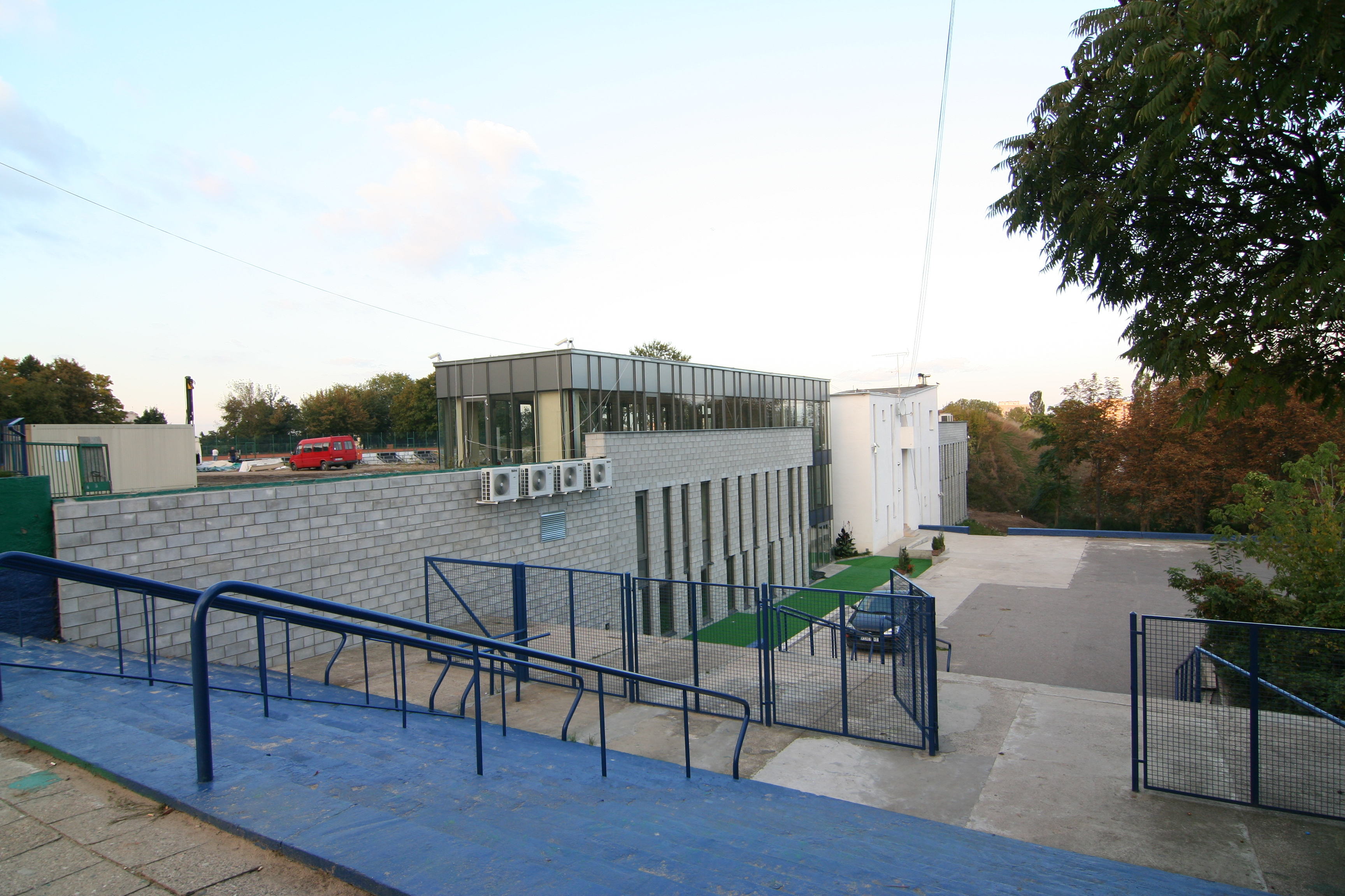 Warszawianka